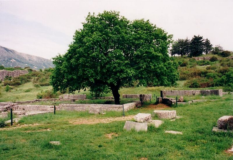 Dodoni galt als ältestes Orakel Griechenlands und war nach Delphi das bedeutendste überregionale Orakel der griechischen Welt. Ansicht des Zeustempel.